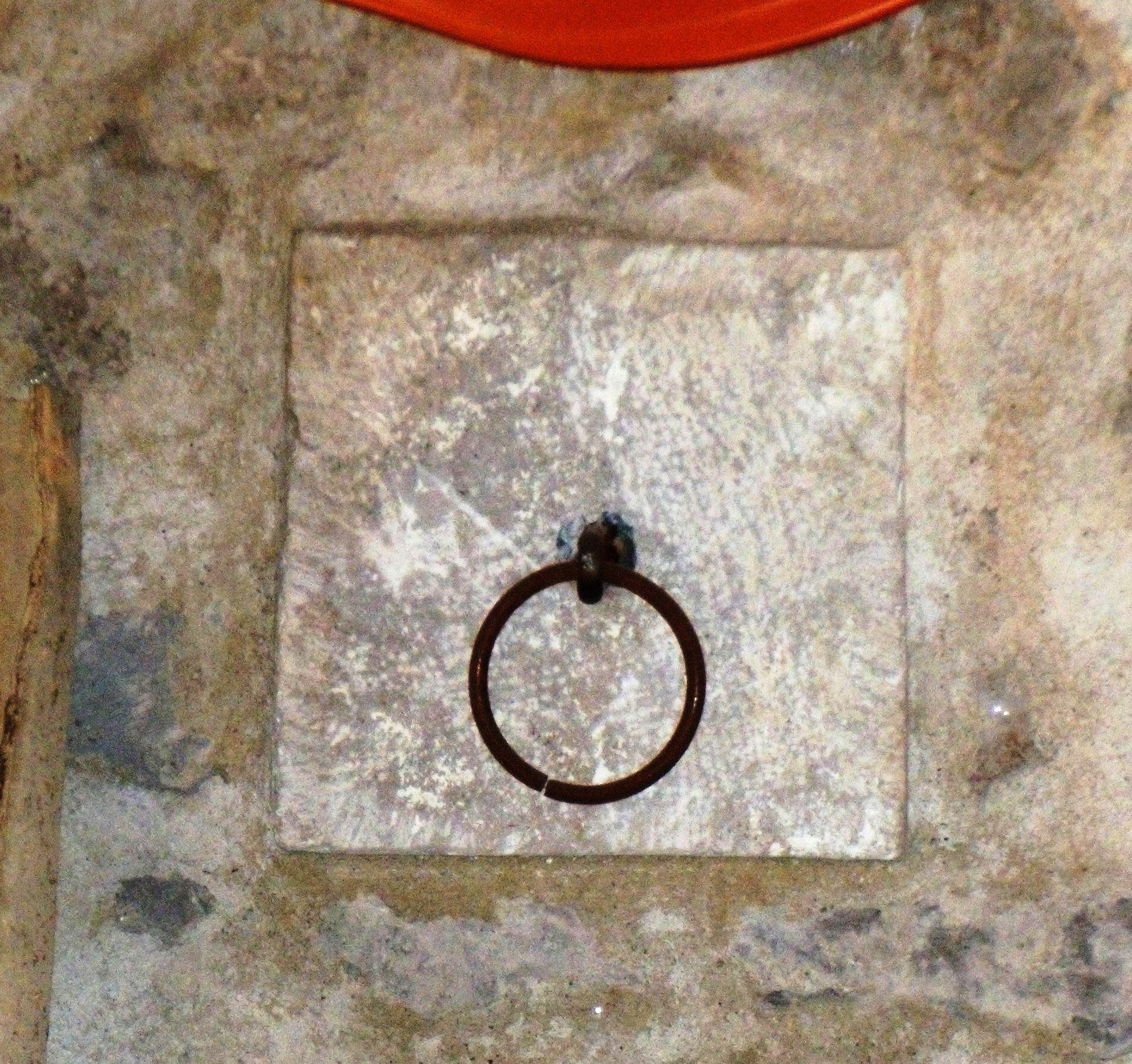 Interno delle carceri feudali di Cerreto Sannita.